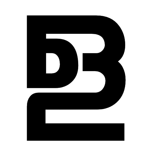 ള മലയാളം അക്ഷരം